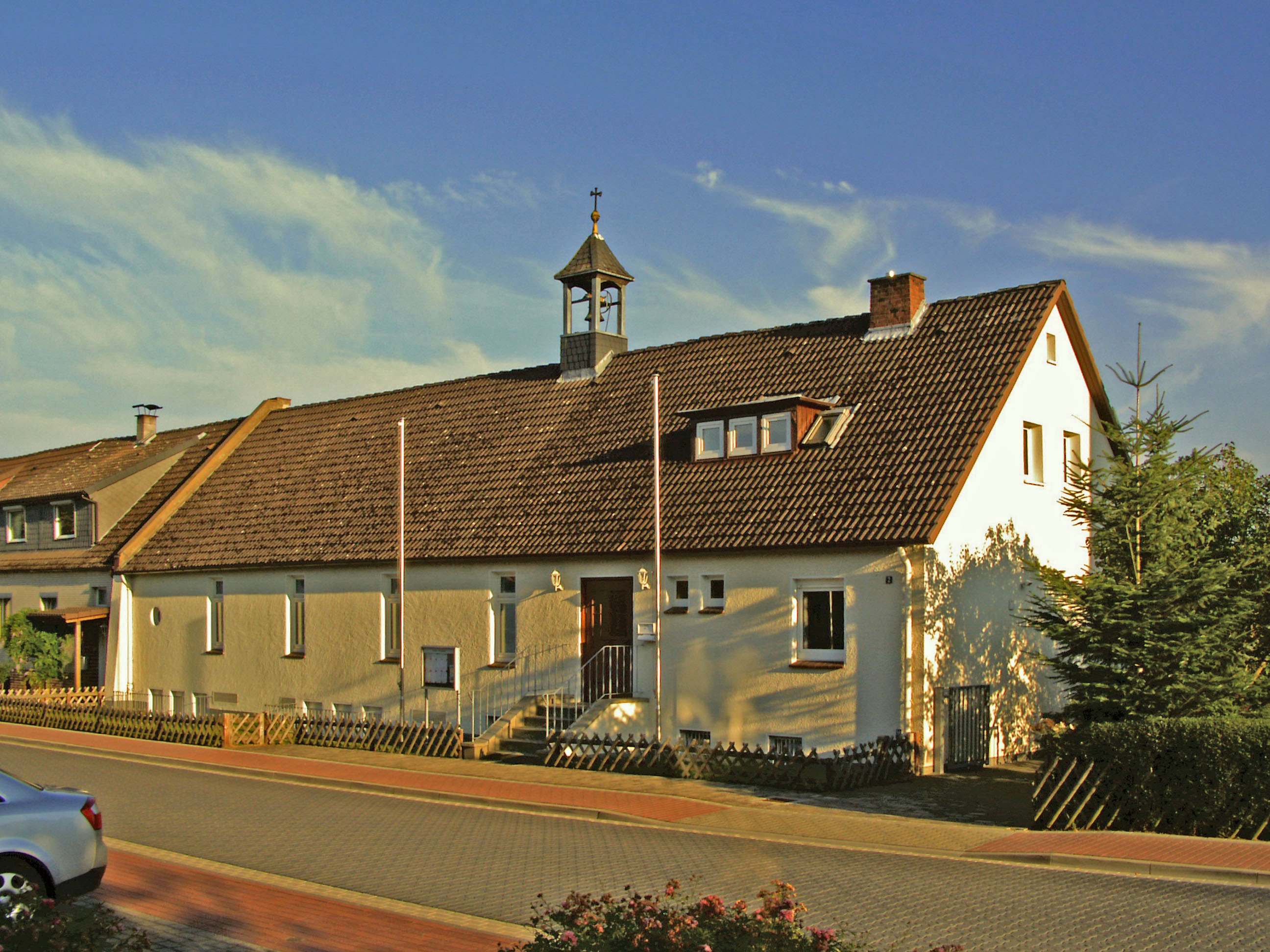 Katholische Kirche Maria Himmelfahrt in Wesendorf, Landkreis Gifhorn